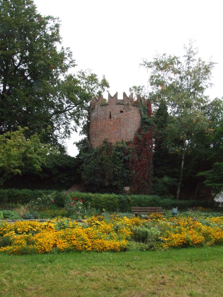 Schwalbenschwanzturm oder auch Grimmelturm genannt (1445 erbaut)